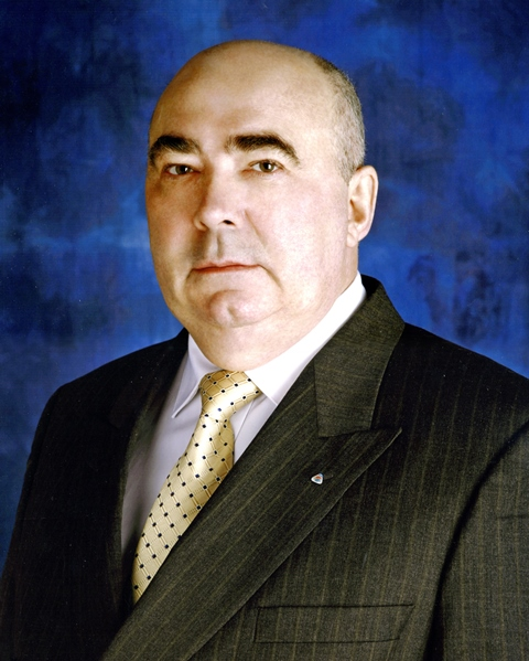 Известный ученый-геофизик, исследователь Арктики и Антарктики Казанин Геннадий Семенович